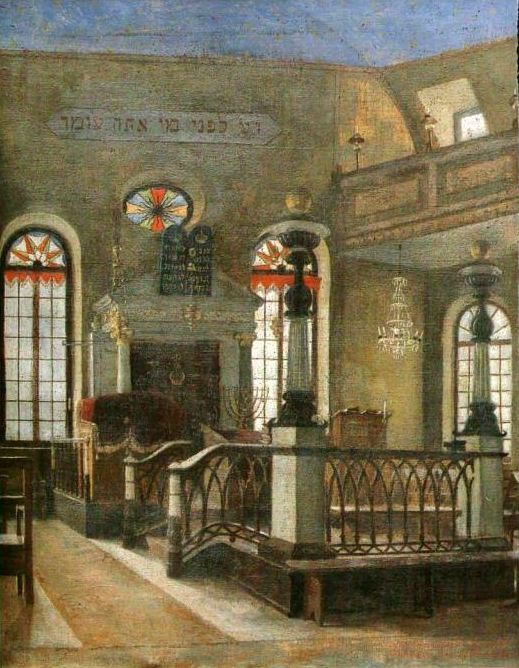 Interieur vun der éischter Synagog (1823) an der Stad Lëtzebuerg, gemoolt vum Guido Oppenheim (1862-1942) .